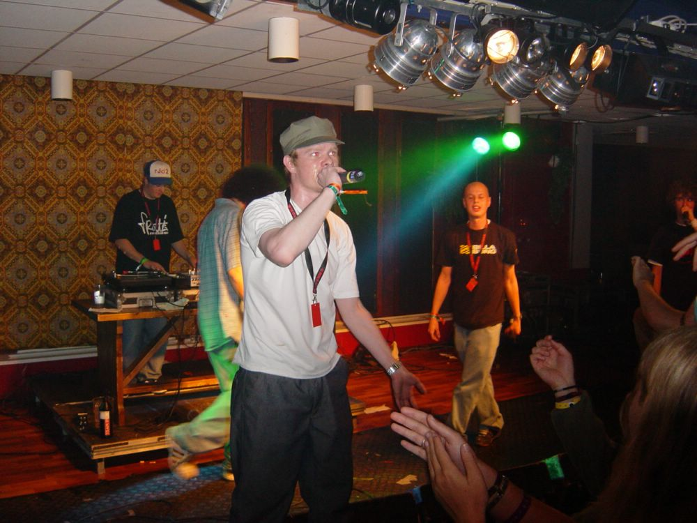 Frotté och DonKrille live på Peace and Love 2003